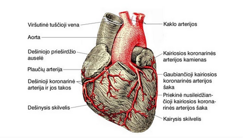 koronarinės širdies kraujagyslės